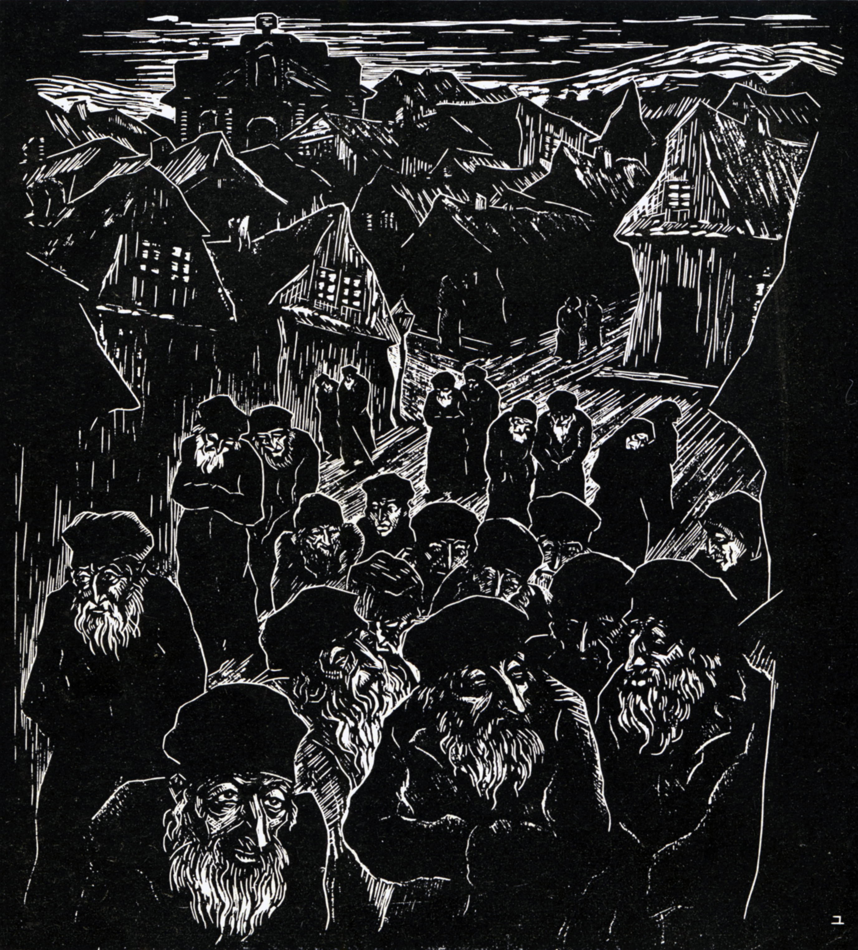 Print